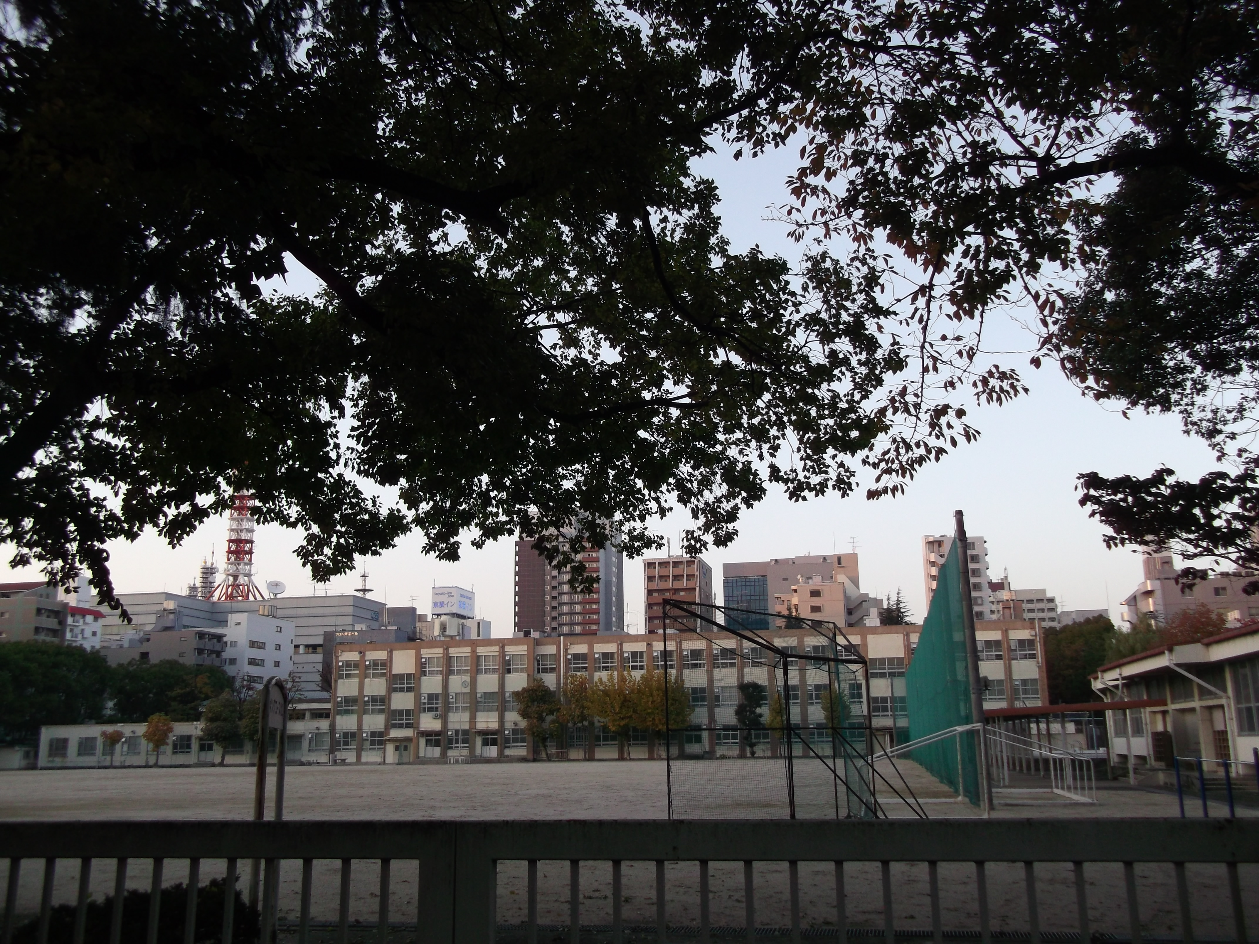 名古屋市立白山中学校校地を南側から写す